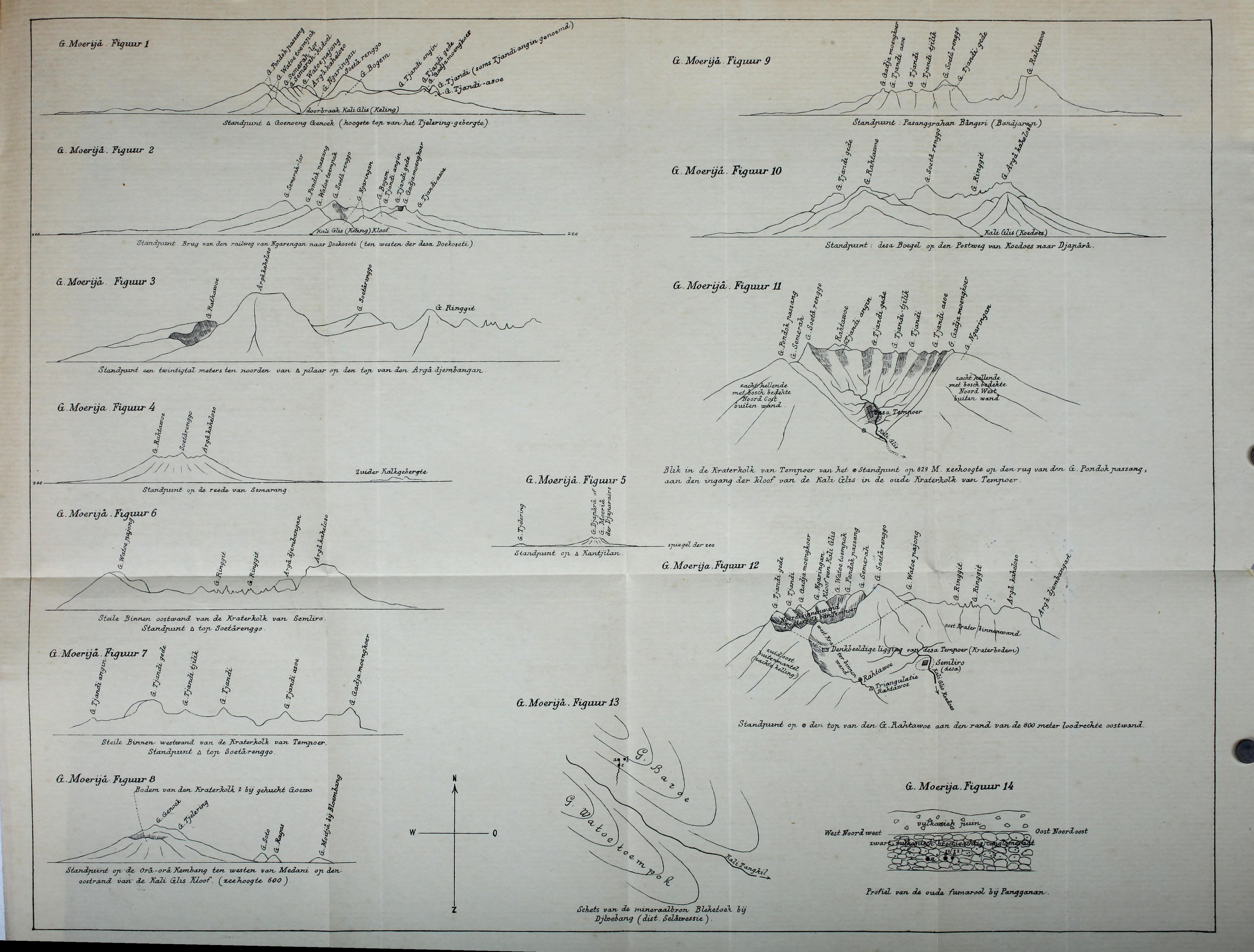 Natuurkundig tijdschrift voor Nederlandsch Indië / uitgegeven door de Natuurkundige Vereeniging in Nederlandsch Indië.